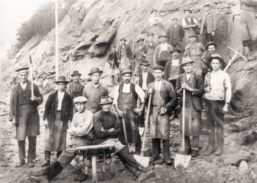 Arbeiter beim Bau der Wieslauterbahn